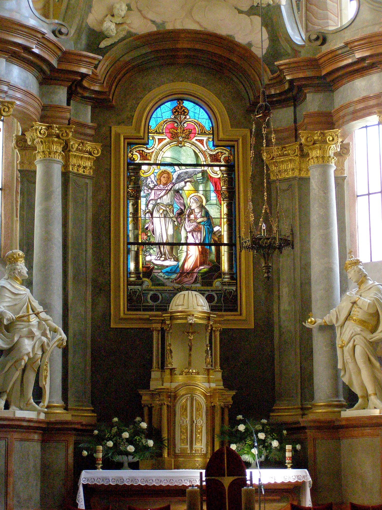 Hlavný oltár kostola pochádza z rokov 1720 - 1730. Namiesto tradičného oltárneho obrazu je tu sklomaľba na okne s námetom Zvestovanie Panne Márii. Po bokoch oltára sa nachádzajú sochy sv. Štefana a sv. Imricha